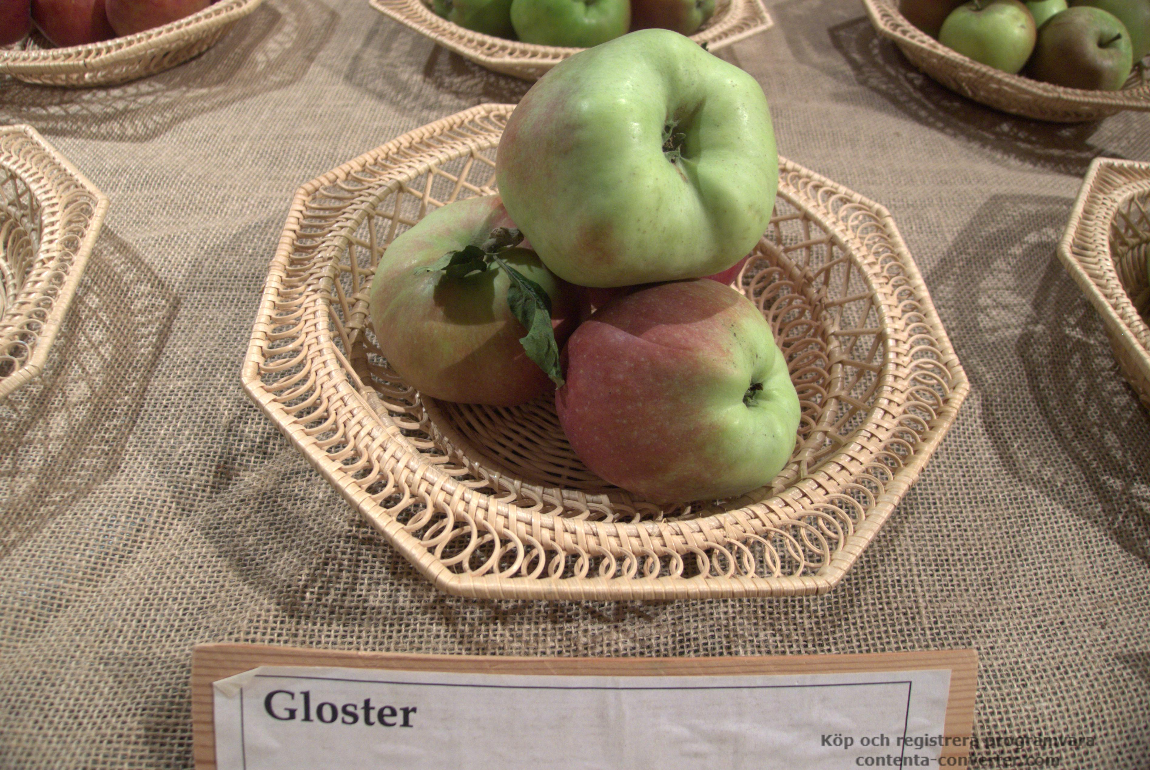 Äpplen av sorten Gloster